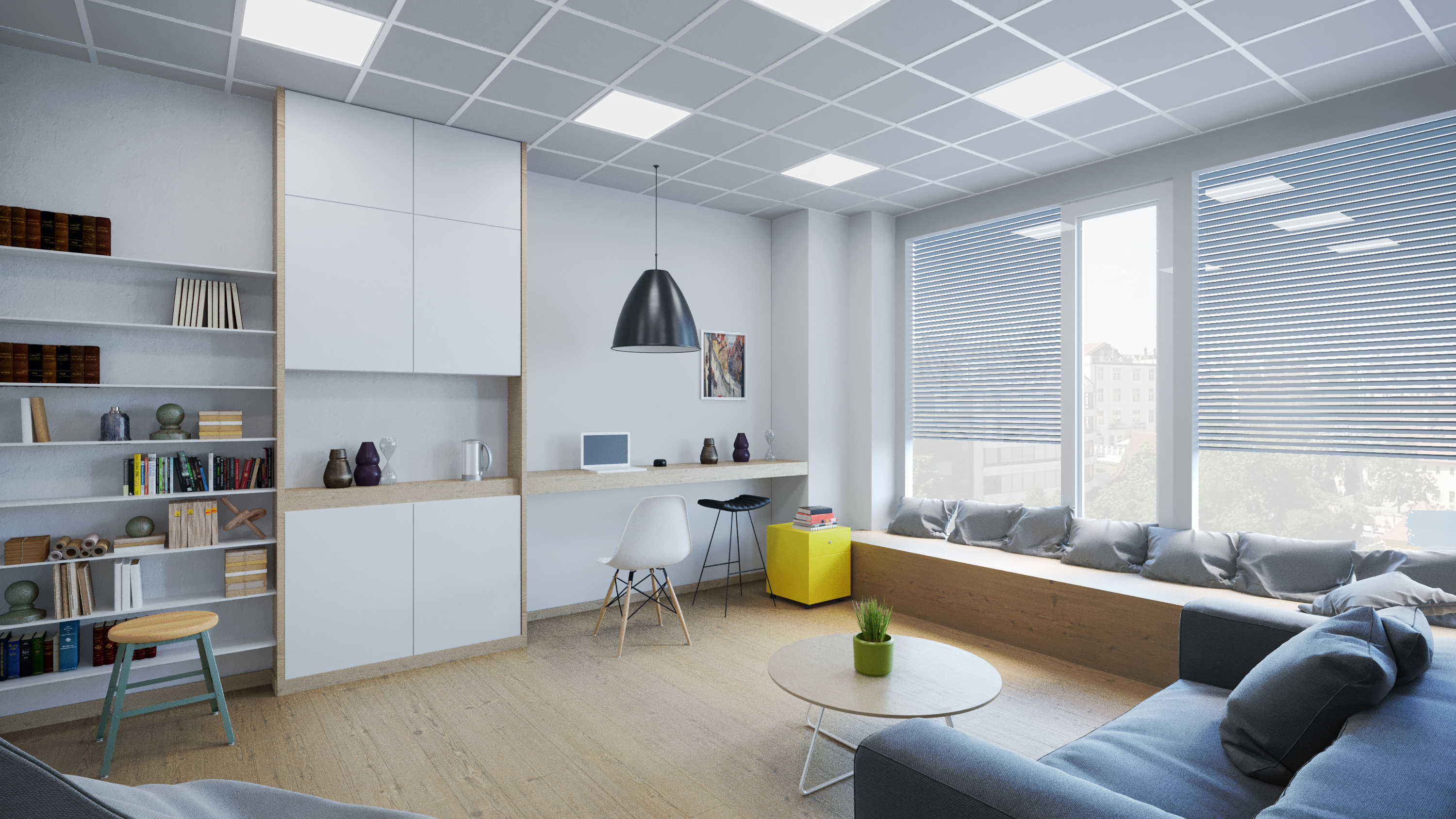 Apartmán Campus VŠEM